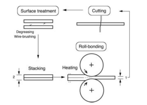 شماتیک فرآیند نورد تجمعی